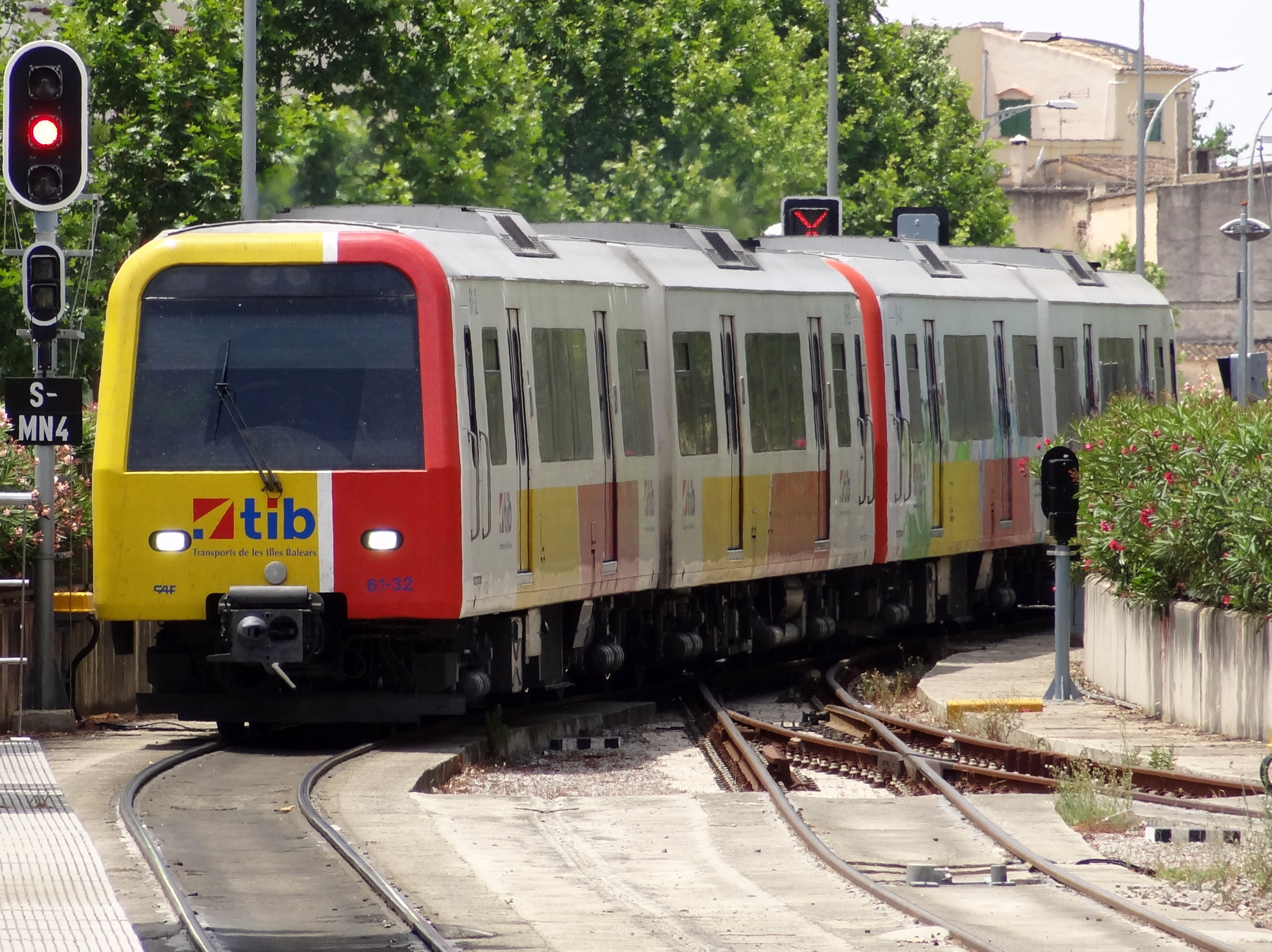 Einfahrt eines Dieseltriebzuges der tib in den Bahnhof von Manacor, Mallorca, Spanien